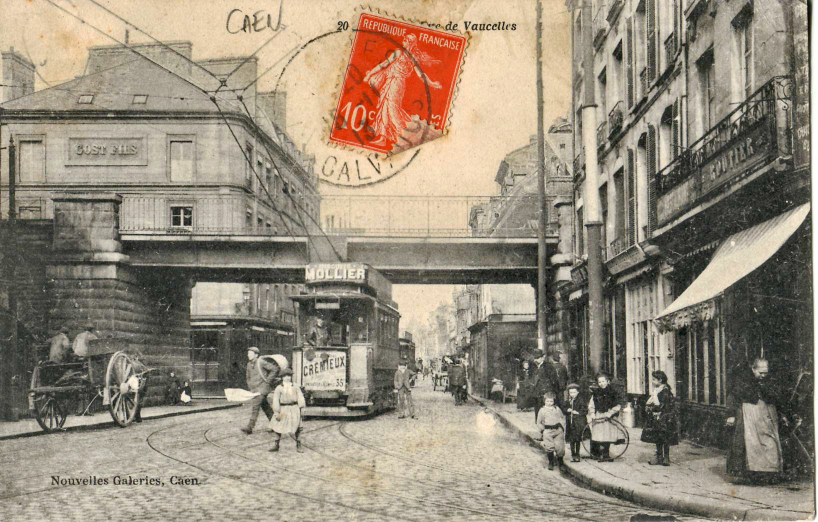 Carte postale ancienne éditée par les Nouvelles galleries à Caen, n°20 : CAEN - Rue de Vaucelles